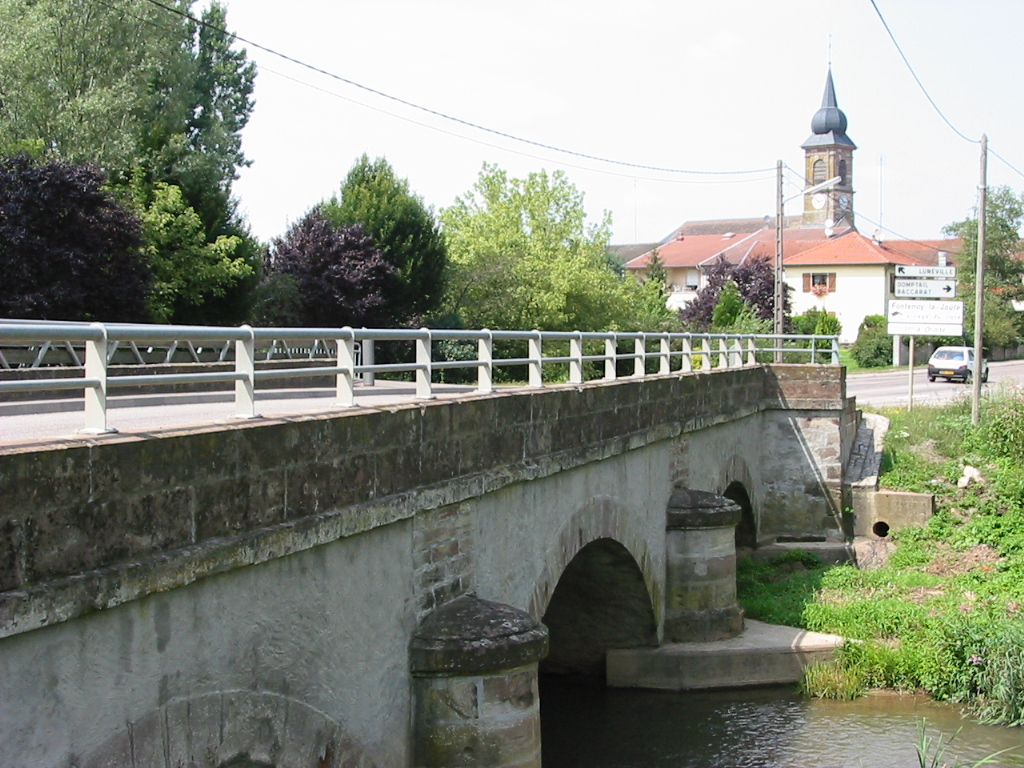 Saint-Pierremont, commune des Vosges : pont sur la Belvitte